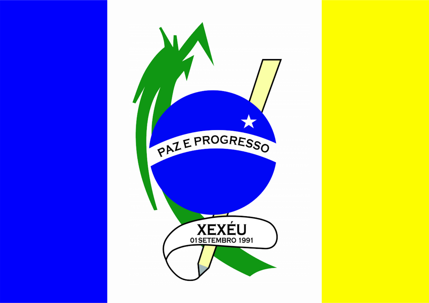 Bandeira de Xexéu